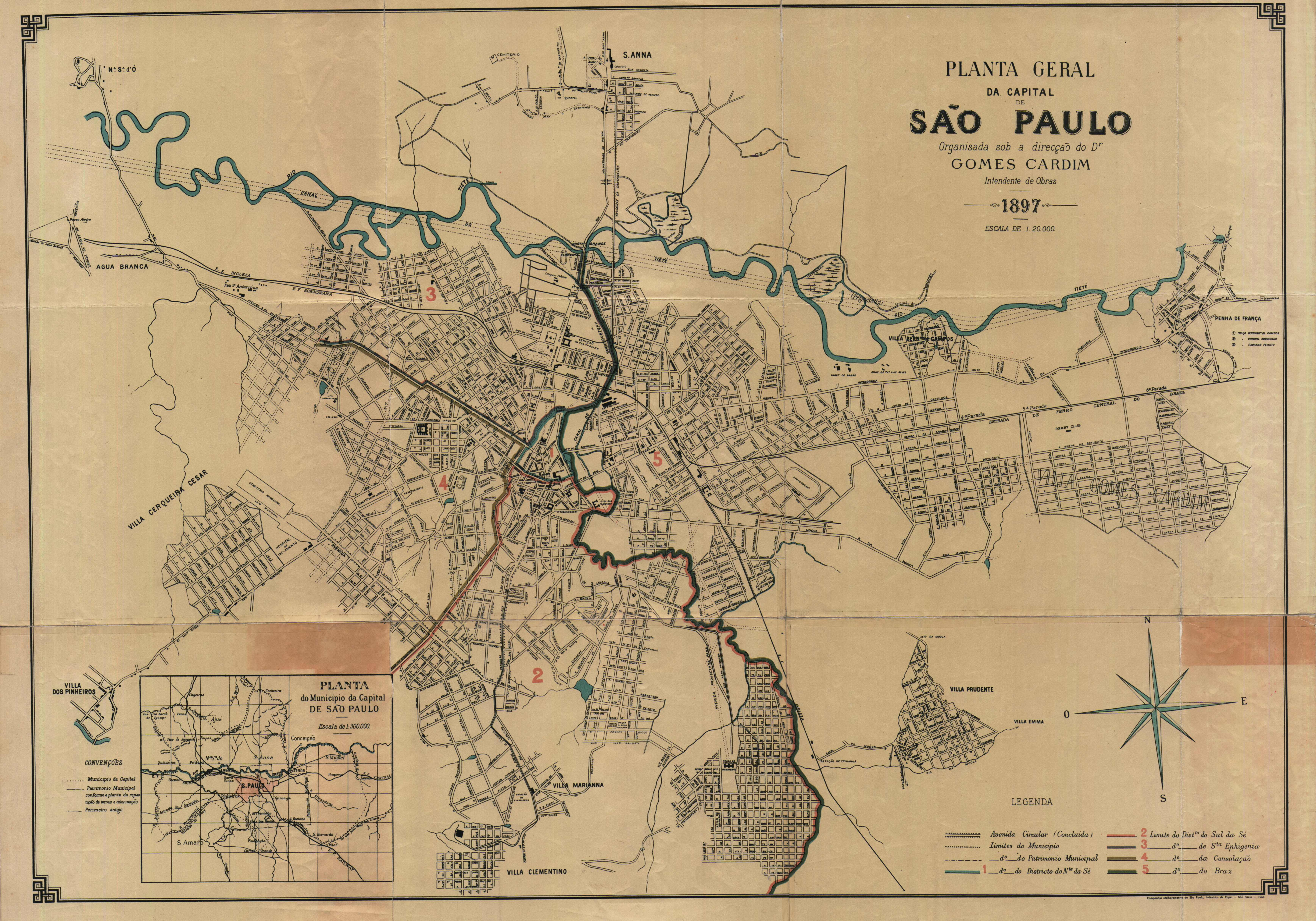 Original impresso de Dr. Pedro Augusto Gomes Cardim – 1897